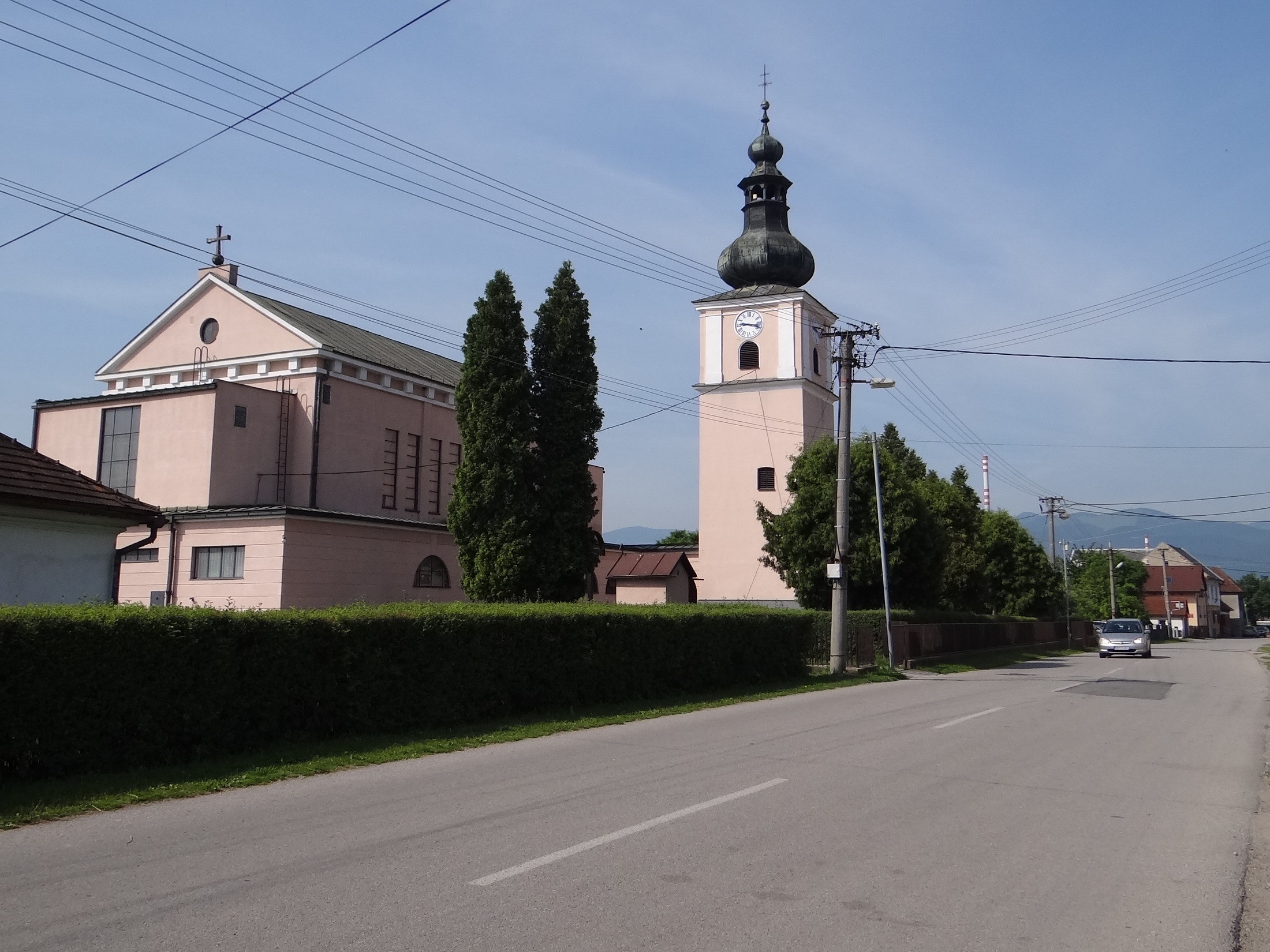 Lisková